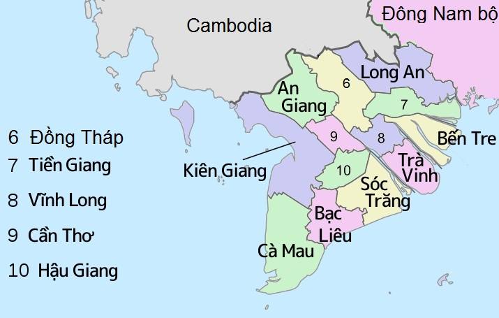 Administrative map of Vietnam's Mekong Delta. Bản đồ hành chính Tây Nam bộ.